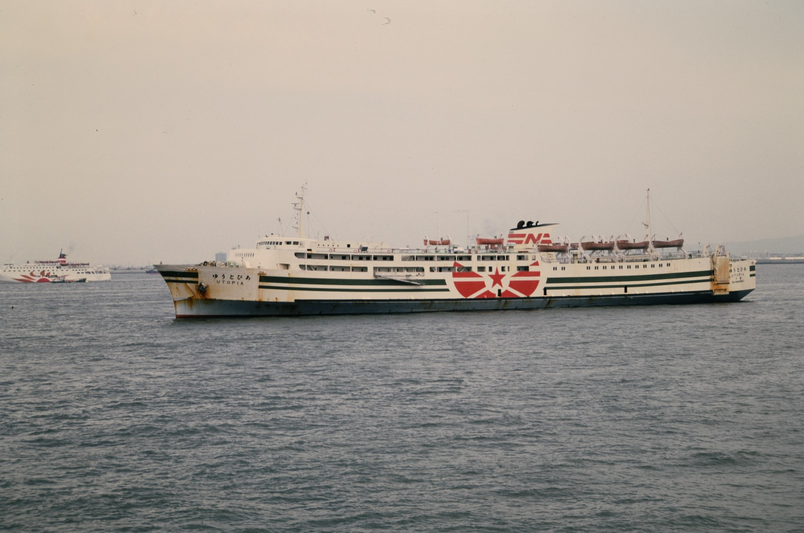 大阪湾内の西日本汽船・ゆうとぴあ。船首のドームは撤去され、チャータークルーズ船として活躍の時期。向こうに関西汽船・さんふらわあ7が見える。